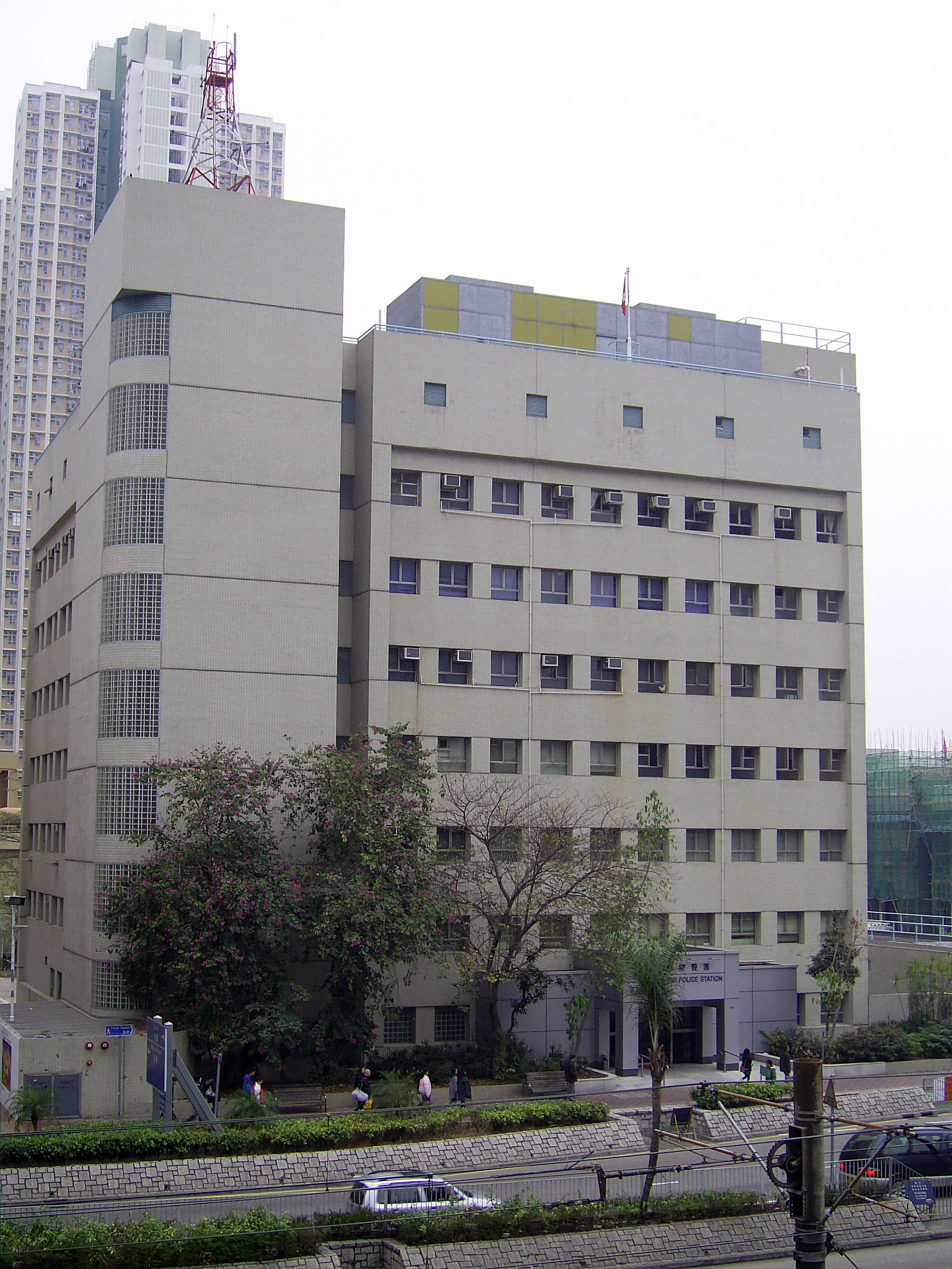 中文（香港）: 天水圍警署